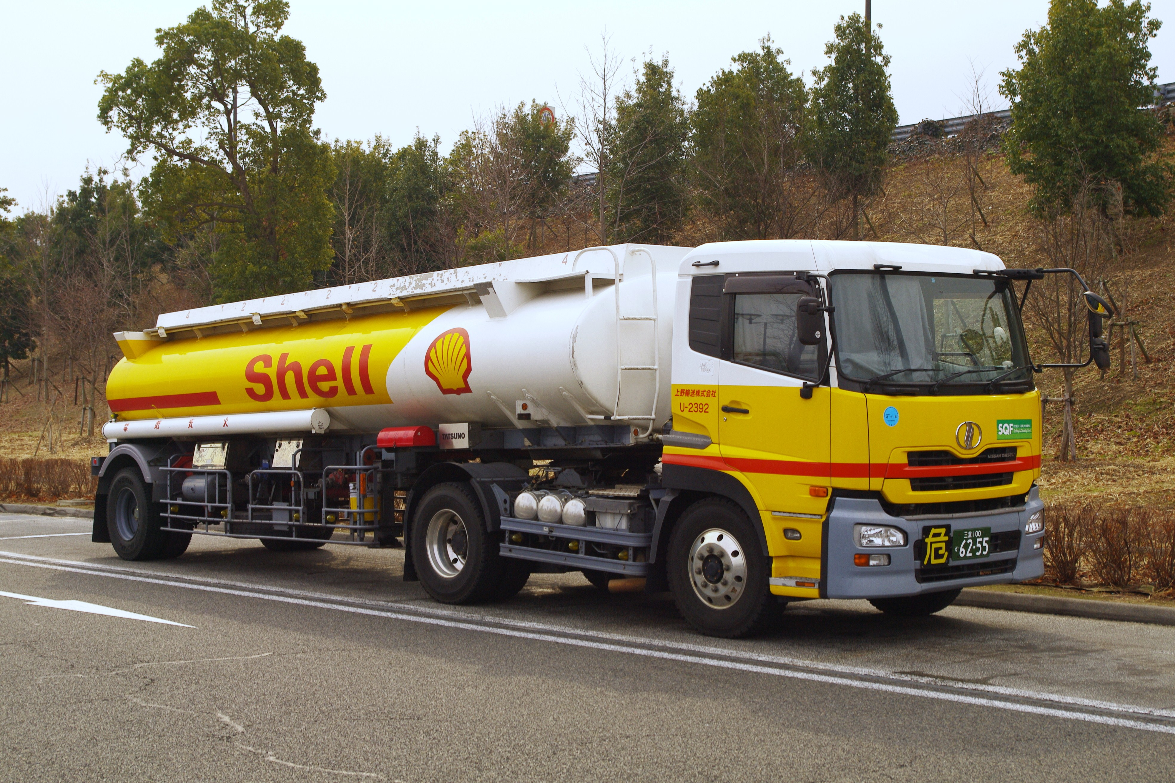 上野輸送が保有する昭和シェル石油カラーのタンクローリー